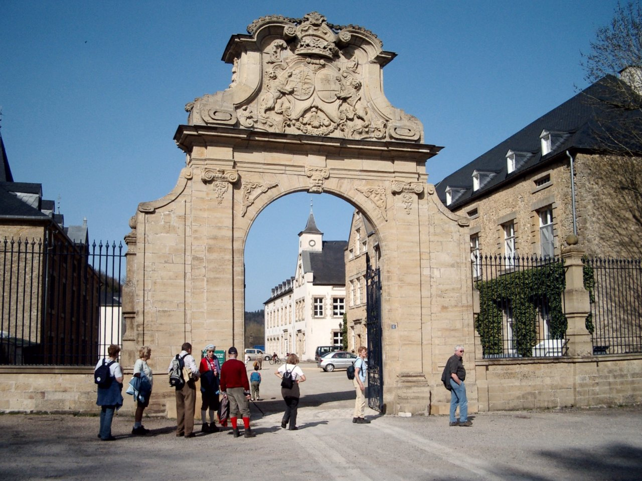 Sujet: Ansebuerg, Ã«nnescht Schlass